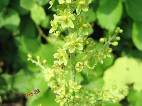 Vetratum parviflorum